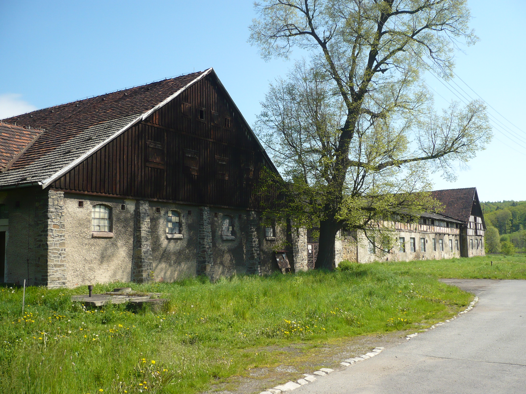 Wałbrzych Lubiechów. Folwark